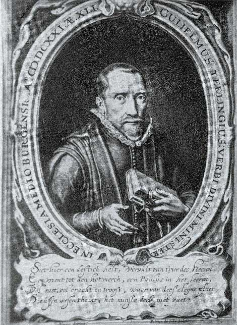 afbeelding van Willem Teellinck (1579-1629)